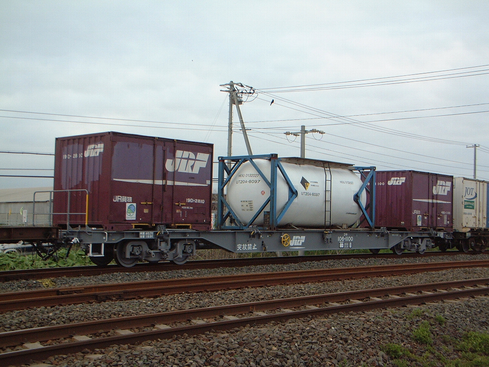 JR貨物コキ106形コンテナ車（コキ106-1100）JR北海道根室本線東庶路信号場で撮影